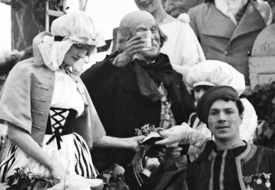 Pierre-Jean de Béranger avec la Lisette sur le char de la Chanson.